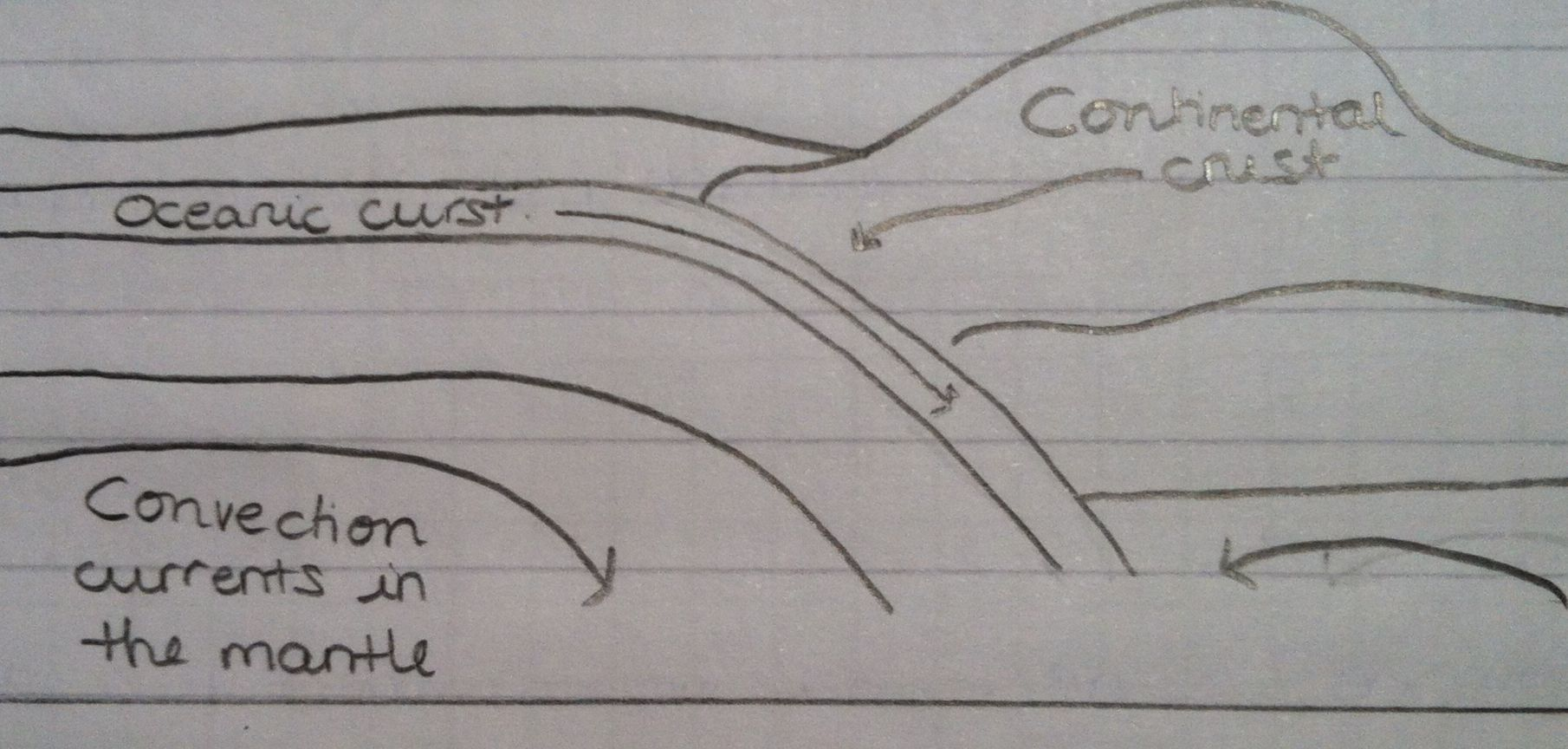 Basal